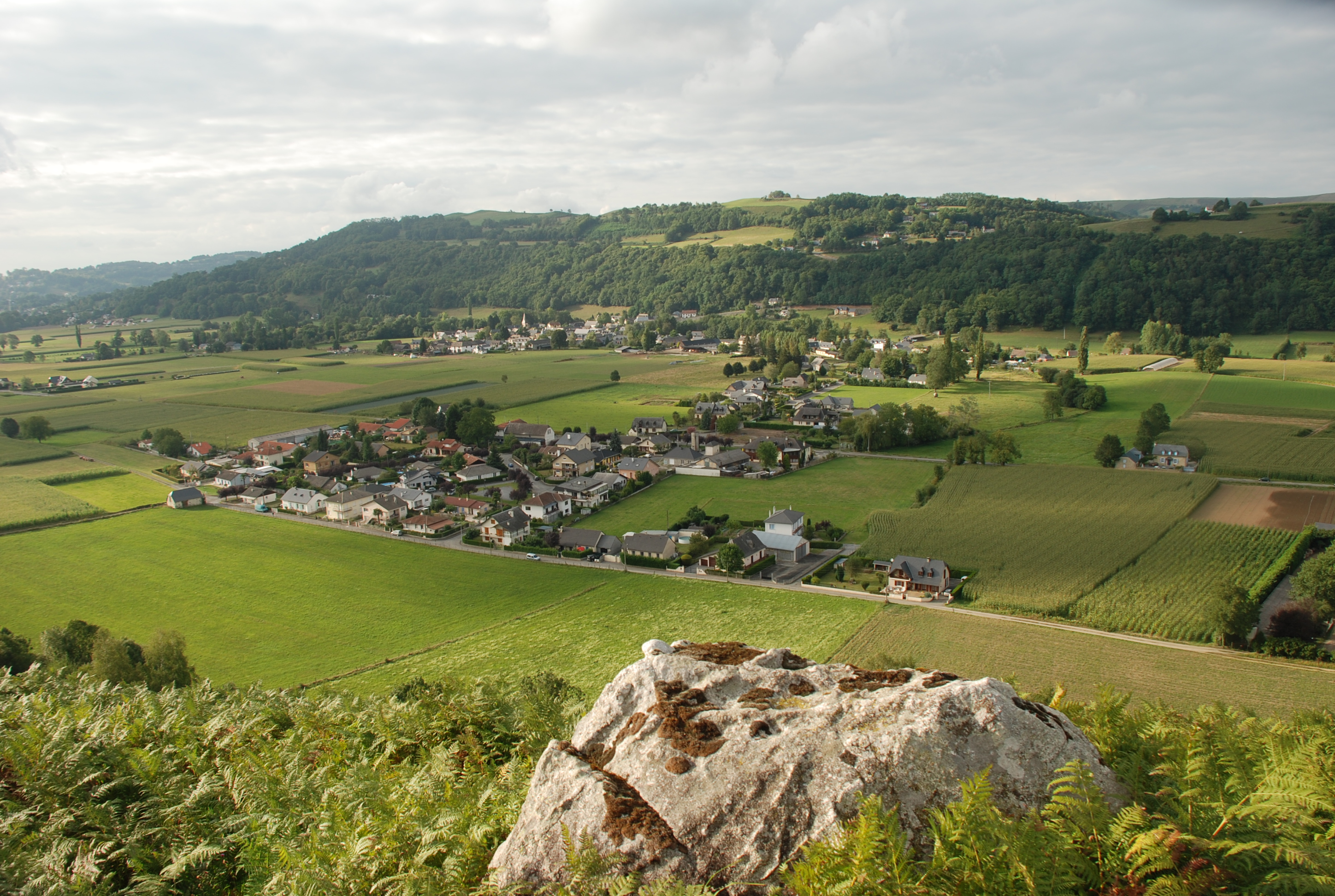 Plaine de Lézignan vue depuis le sommet de la colline du Castet, sur Arcizac ez Angles. Cette colline est couverte de fougères et porte des rochers granitiques arrondis signant sa nature morainique. Au premier plan, le quartier dit de la plaine, au fond le bourg ancien autour du clocher. Lourdes est à gauche, à l'ouest. Au nord, la ligne collinaire de Bourréac.